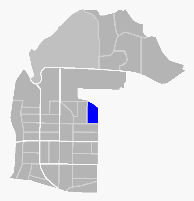 中文（台灣）: 下埤里里界。